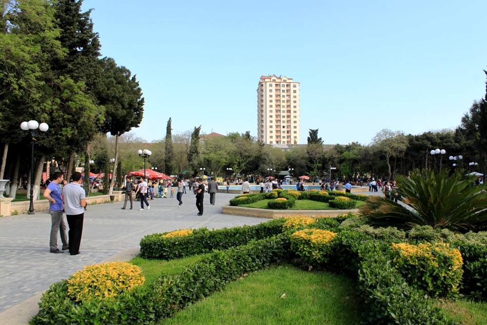 Наримановский район Баку